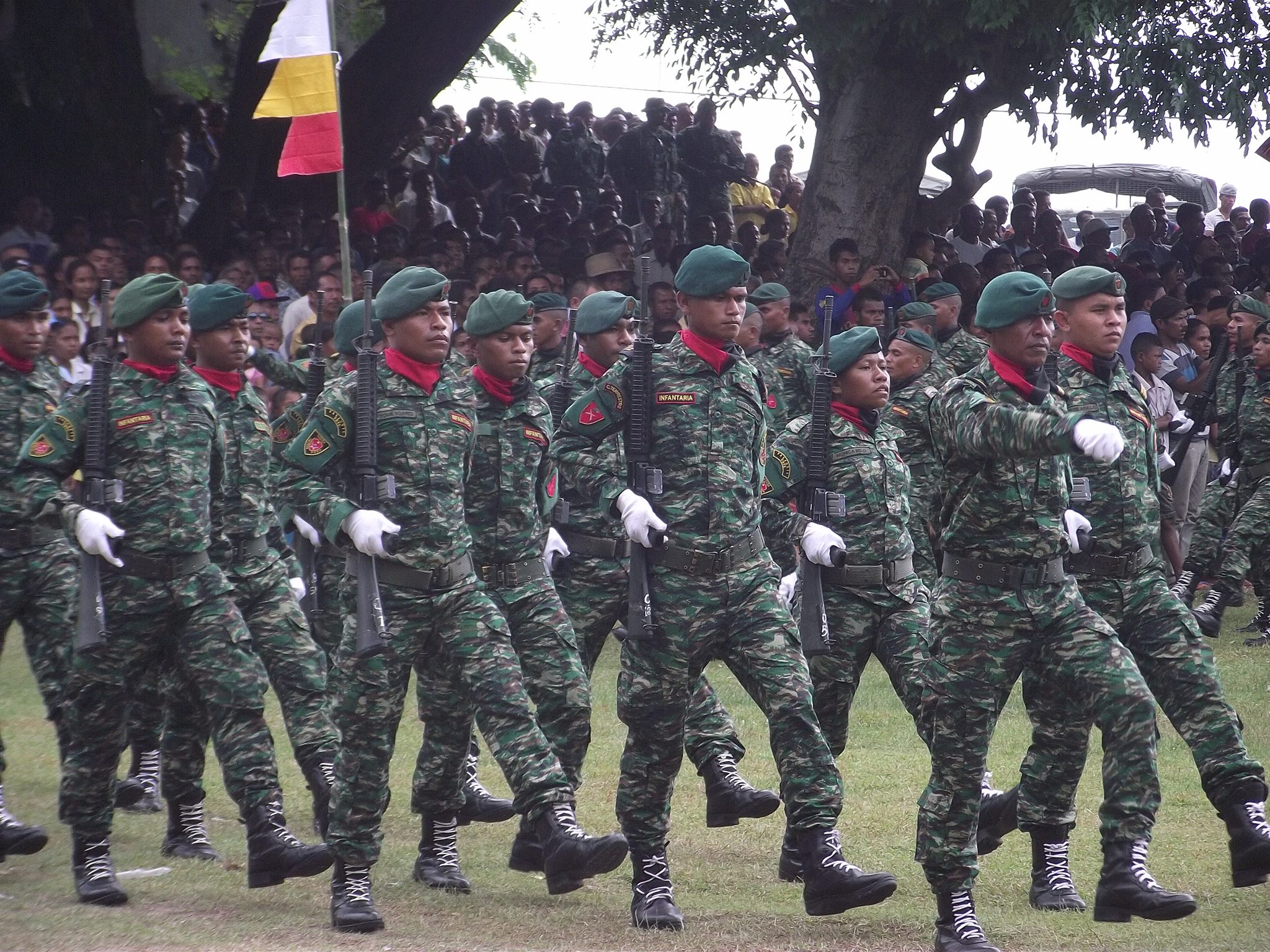 Feiern zum Unabhängigkeitstag in Pante Macassar 2014-05-20